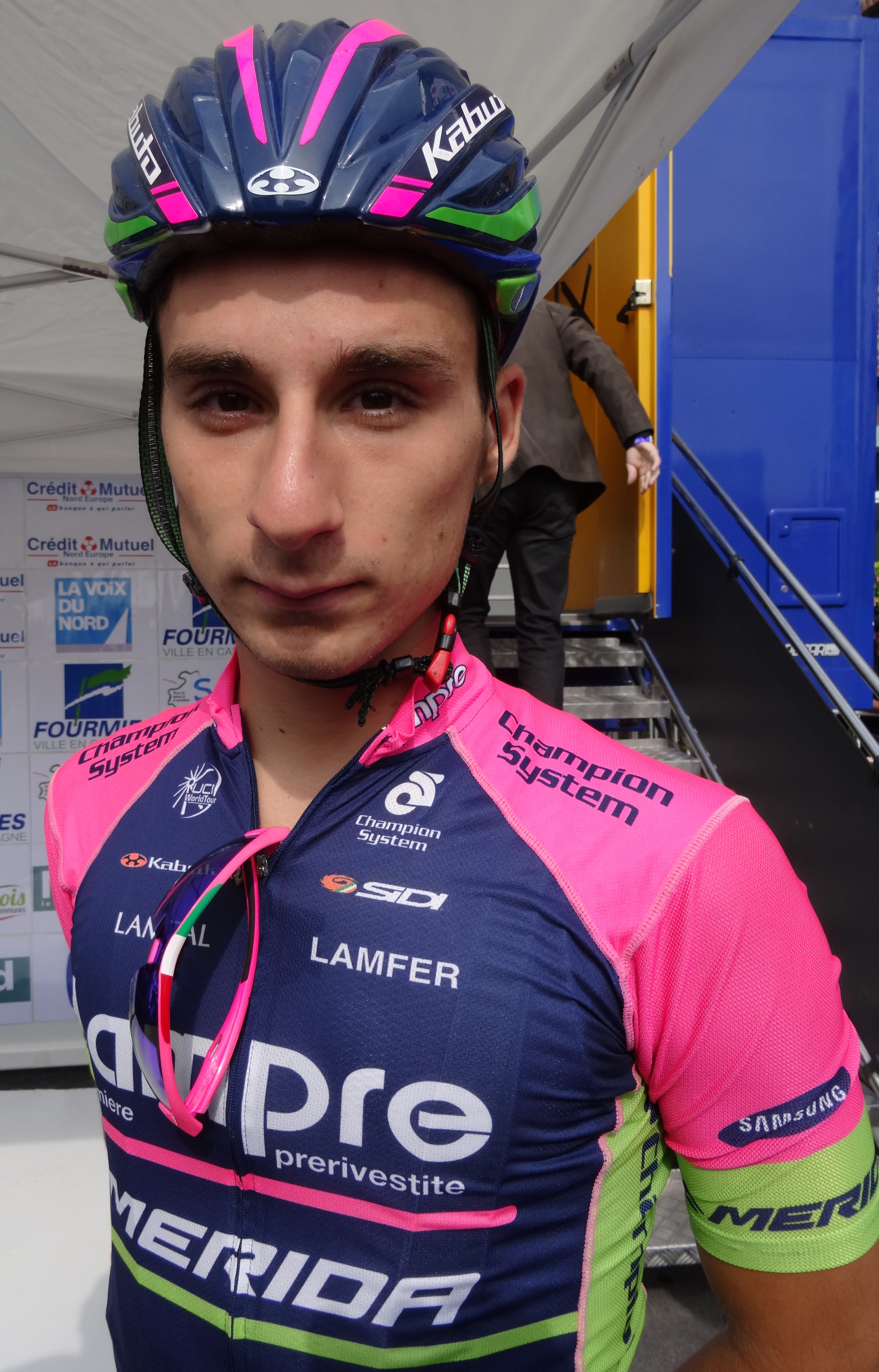 Reportage photographique réalisé le dimanche 7 septembre à l'occasion du départ et de l'arrivée du Grand Prix de Fourmies 2014 à Fourmies, Nord-Pas-de-Calais, France.